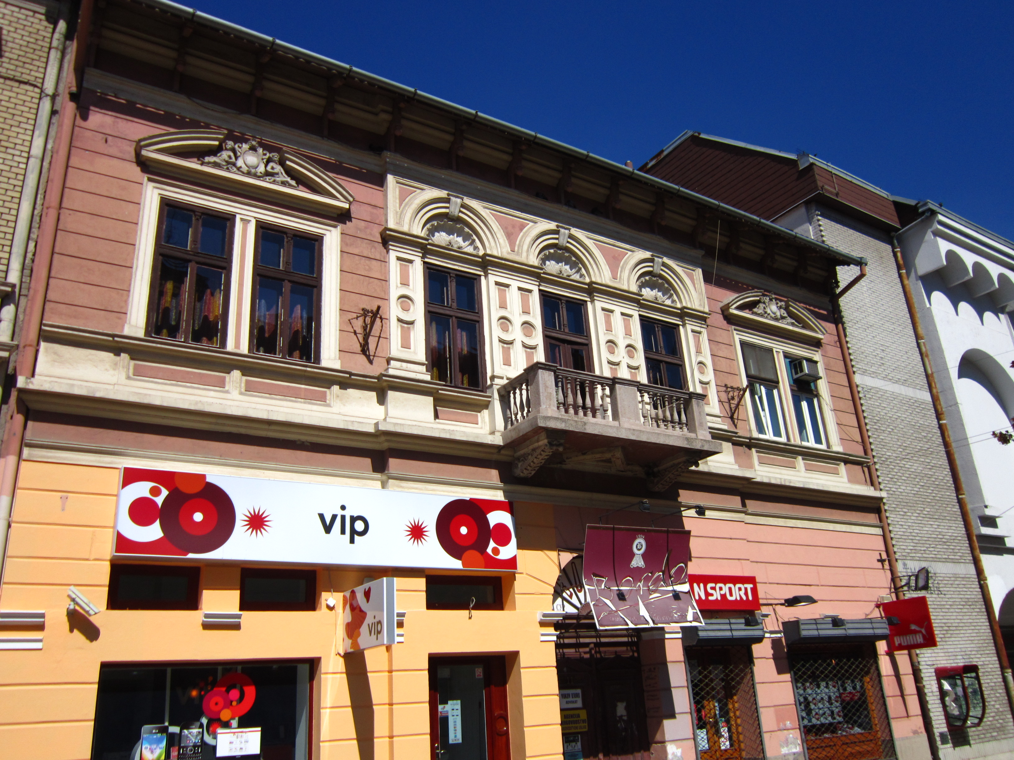 Зграда у Ул. Корзо бр. 11 , Суботица